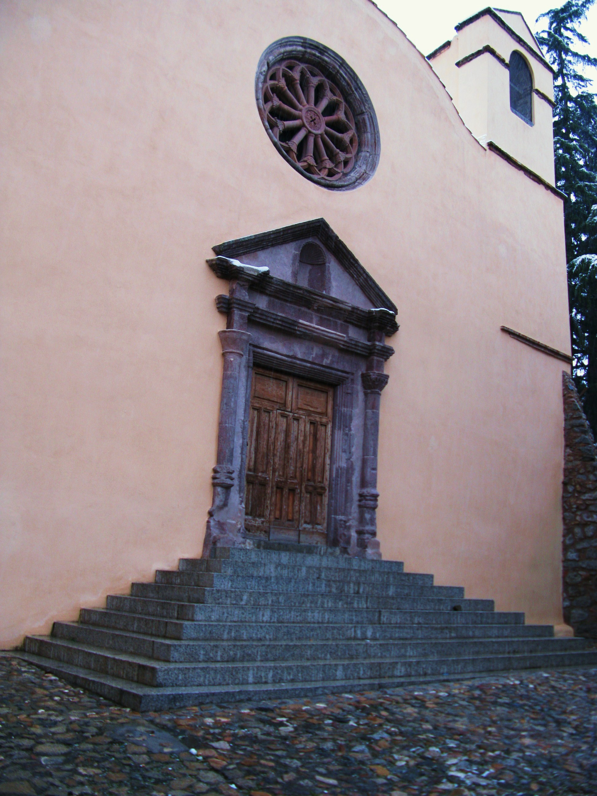 Nuoro - Antico Santuario di Nostra Signora delle Grazie